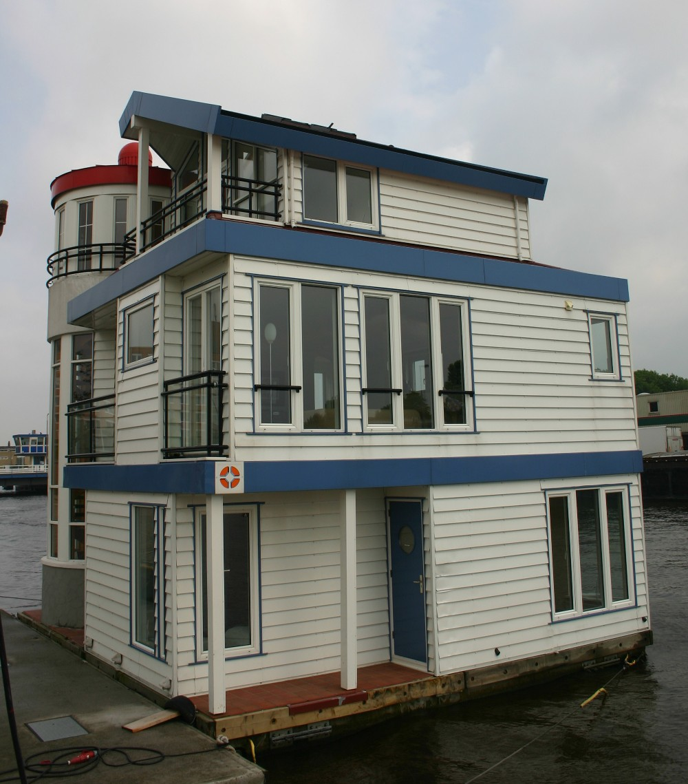 Eigen foto van woonboot met meerdere verdiepingen. Foto te Leeuwarden gemaakt. Boot is inmiddels eigendom van Rentré te Deventer.